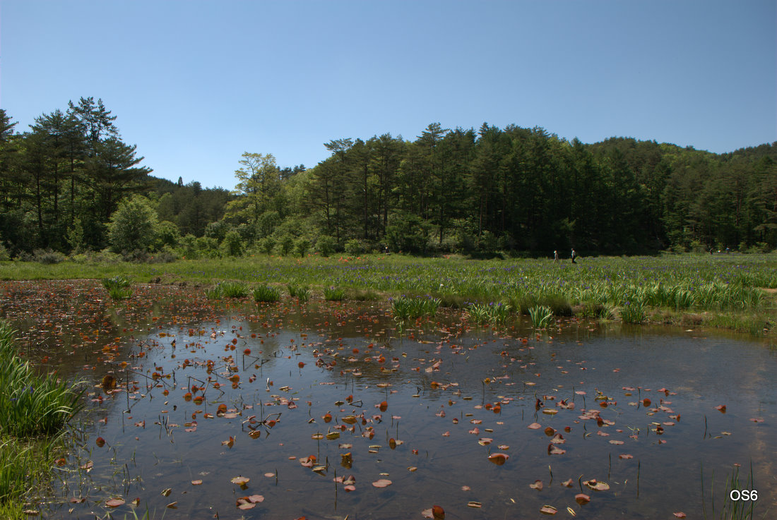 広島県北広島町の八幡湿原